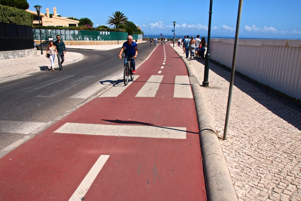 Costa do Estoril Cascais, station balnéaire sur la costa do Estoril à 25 km de Lisbonne